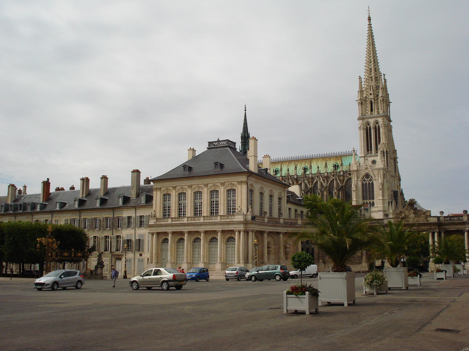 La Basilique Saint-Epvre de Nancy est une basilique de style néogothique construite au XIXe siècle en pierre d'Euville, située place Saint-Epvre dans la Vieille-Ville. La basilique est dédiée à Saint Epvre, évêque de Toul.